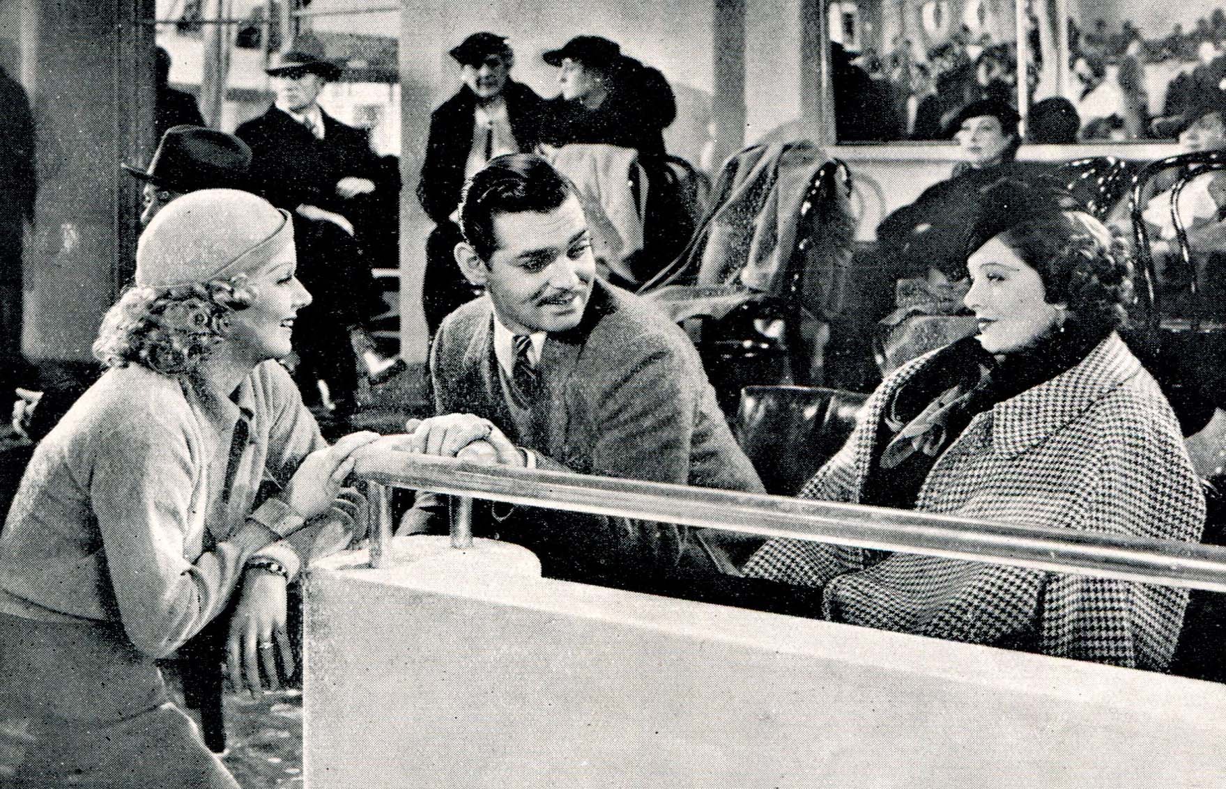 Jean Harlow, Clark Gable e Myrna Loy in Gelosia (tit or. Wife vs. Secretary (1936) - regia C Brown - prod M.G.M.